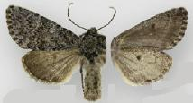 Lasionycta perplexella male